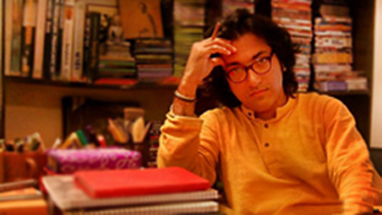 In the time of Interviewing him.